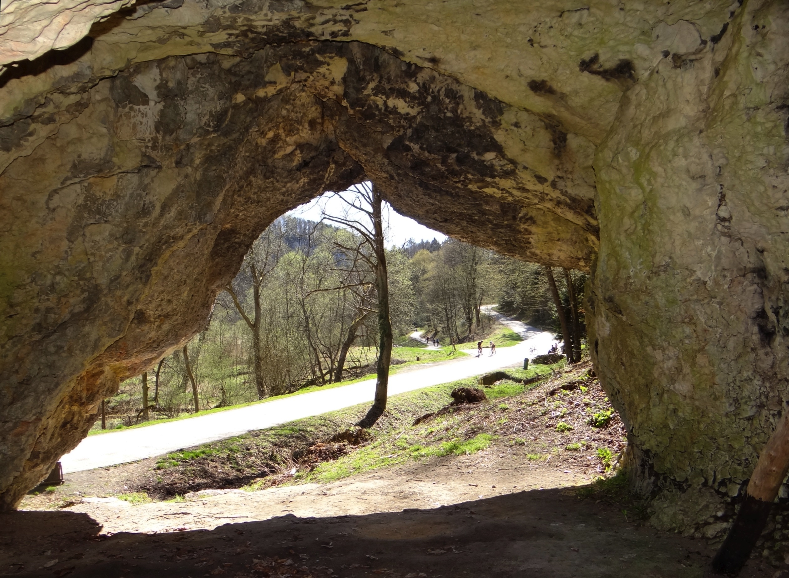 Schronisko Krowie (Jaskinia Krowia) w Ojcowskim Parku Narodowym